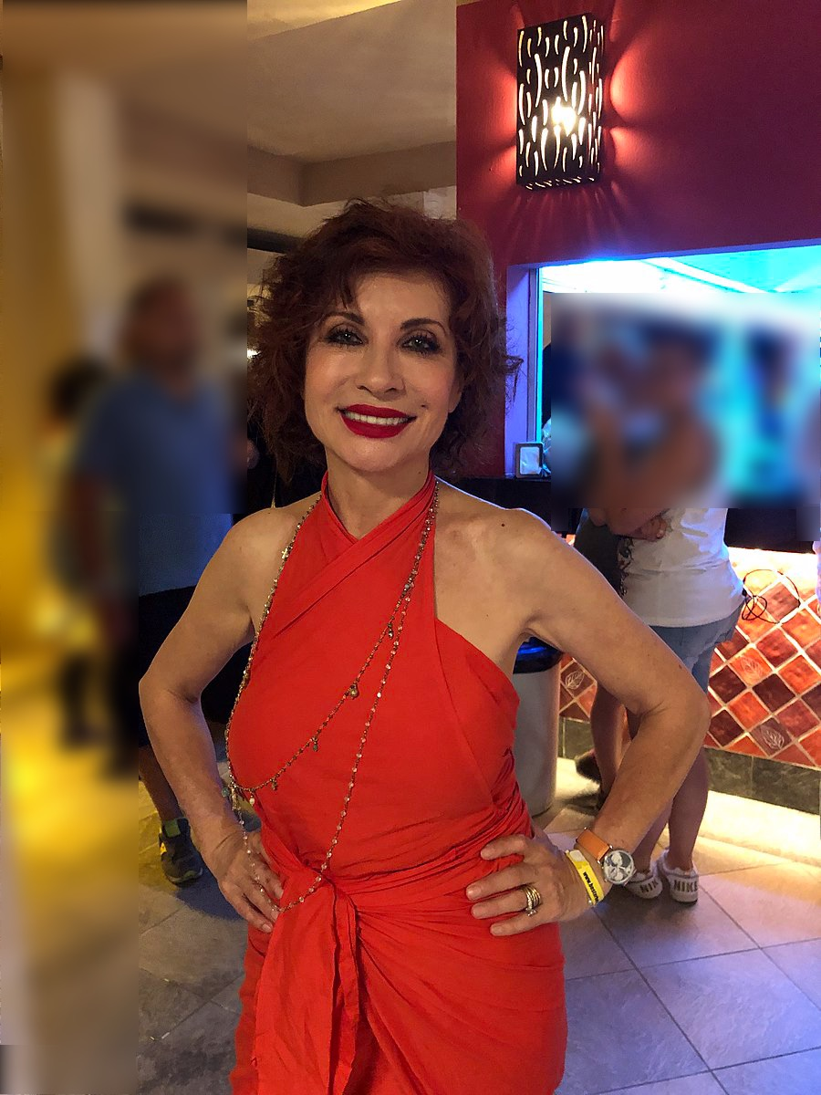 Giornalista italiana